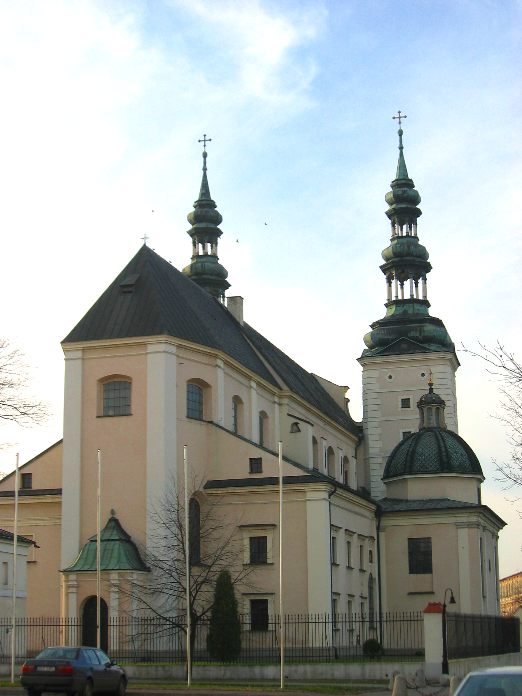 Łowicz Cathedral author User:Mathiasrex Maciej Szczepańczyk